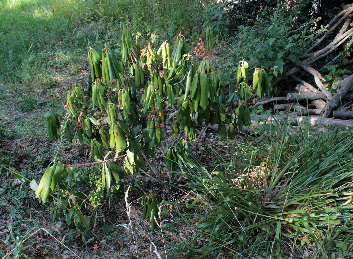 Rhododendron poškození teplem, suchem. Suché léto bez zálivky.